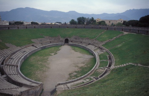 Հին Հռոմեական ճարտարապետություն